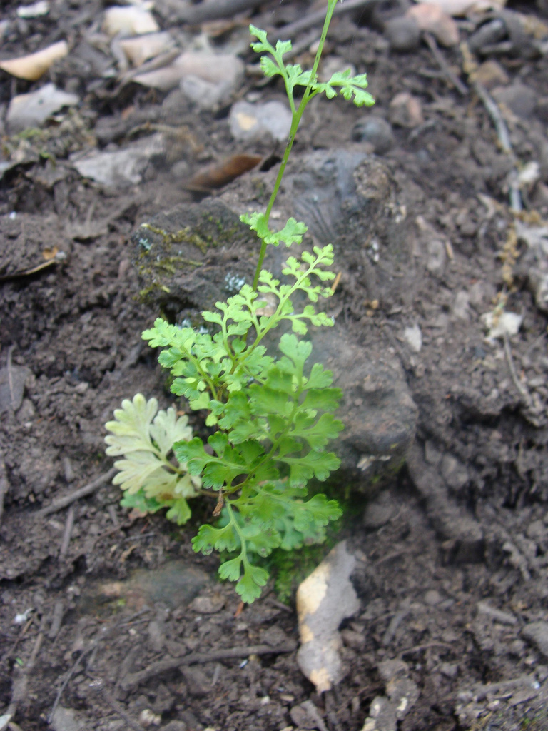 Anogramma leptophylla, Parque Nacional Monfragüe, Spain